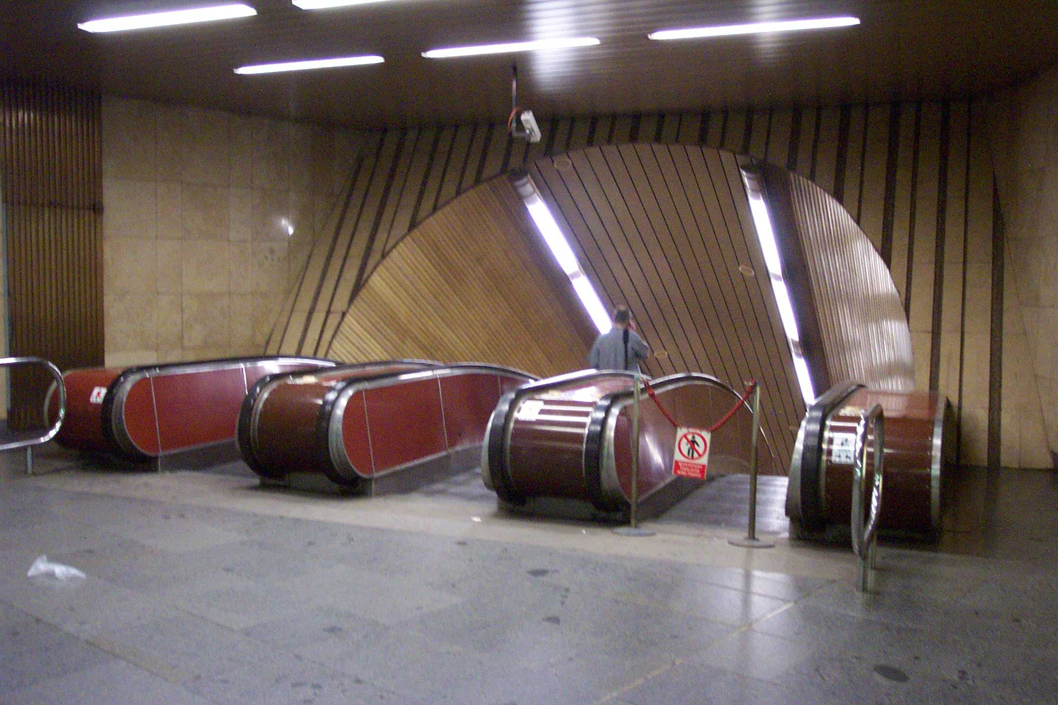 Escalators in station Jiřího z Poděbrad, Prague - Eskalátory ve stanici Jiřího z Poděbrad v Praze